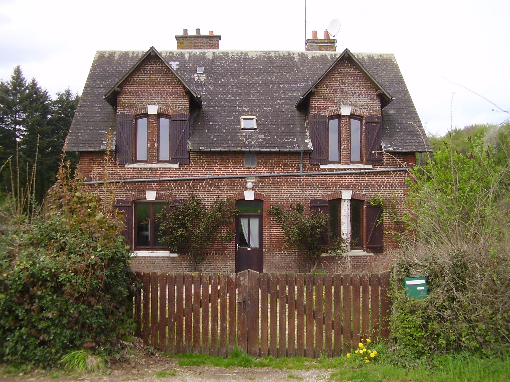 Une des maisons forestières de la forêt d'Eu, établies entre 1847 et 1856